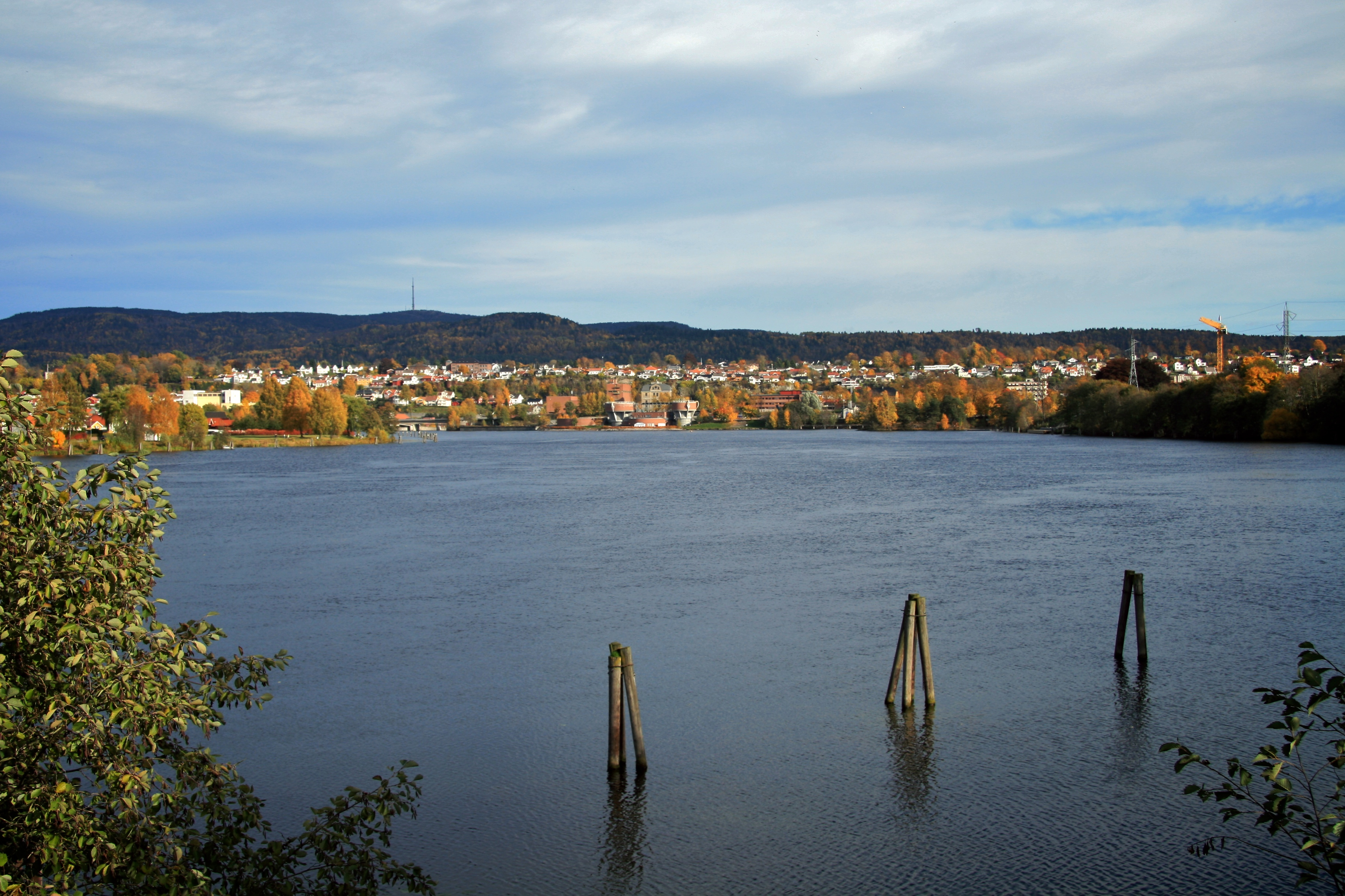 Skien